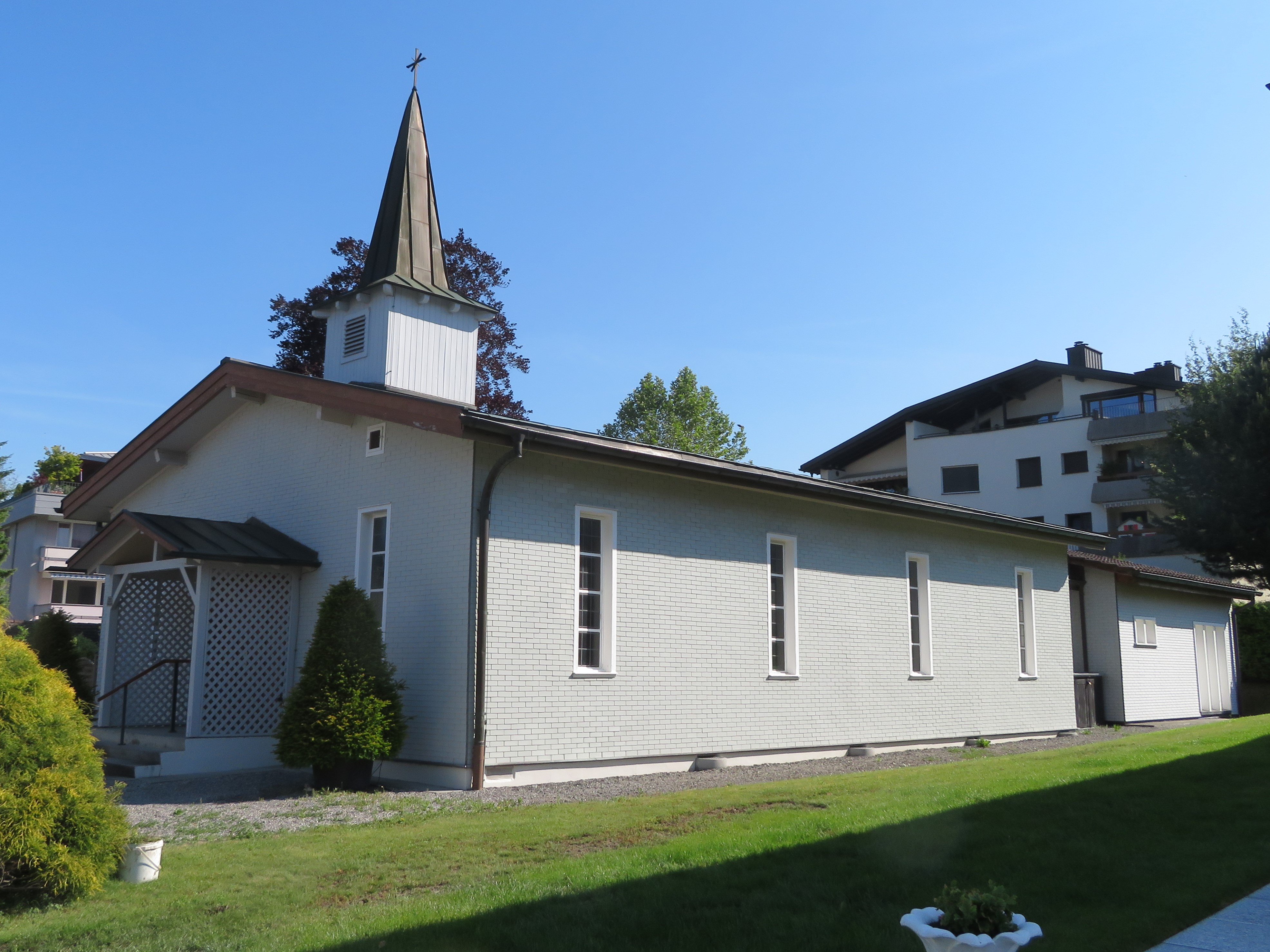 Seitenansicht der Johanneskirche Vaduz